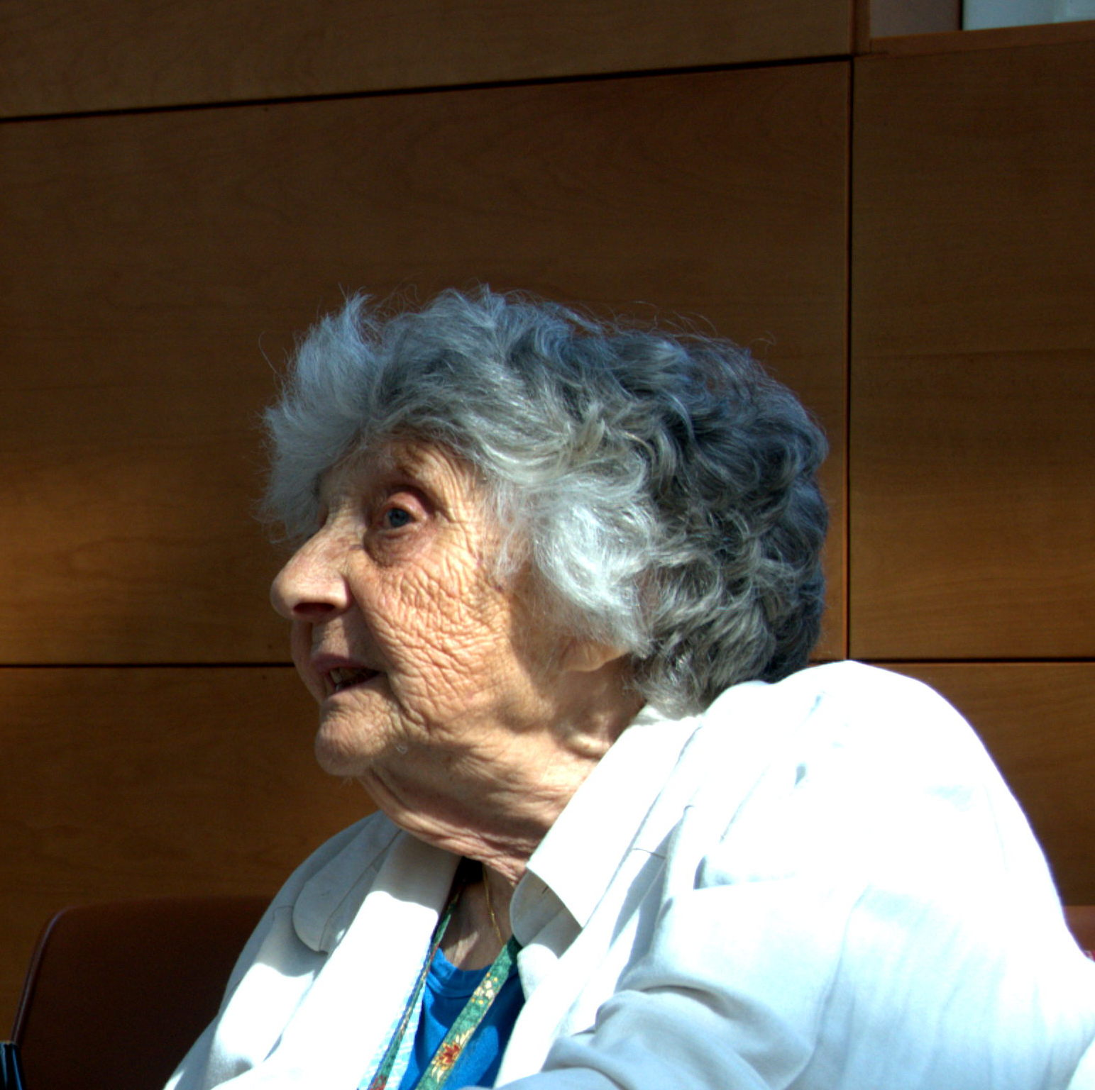 La professoressa Anne Schützenberger intervistata dall'editore romano Di Renzo durante il convegno di psicologia che si è svolto a Roma ad ottobre 2009